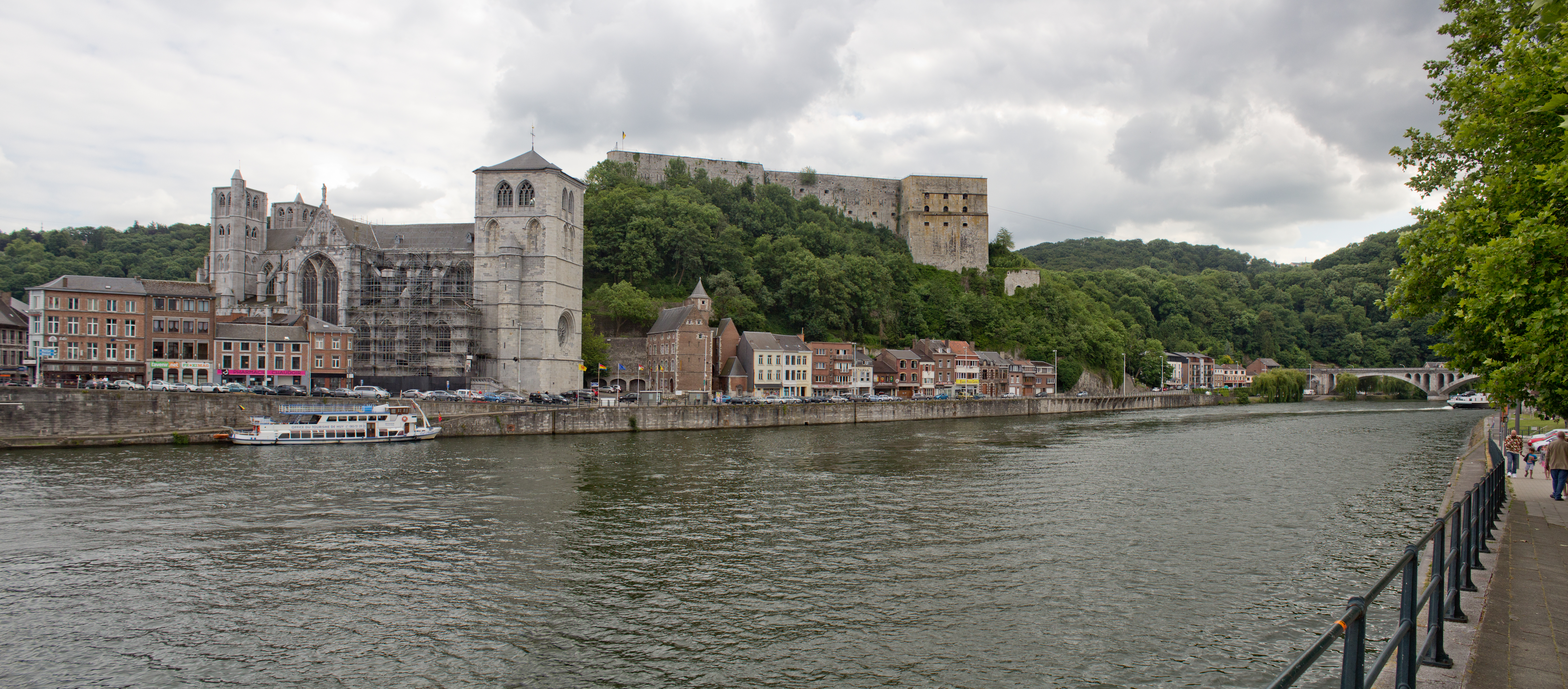 Fort van Huy